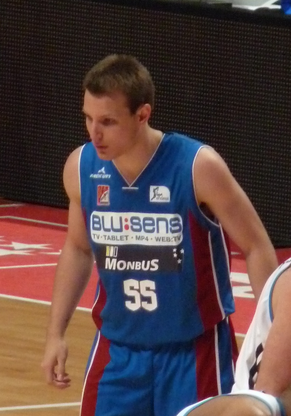 Rafa Luz, jugador brasileño de baloncesto